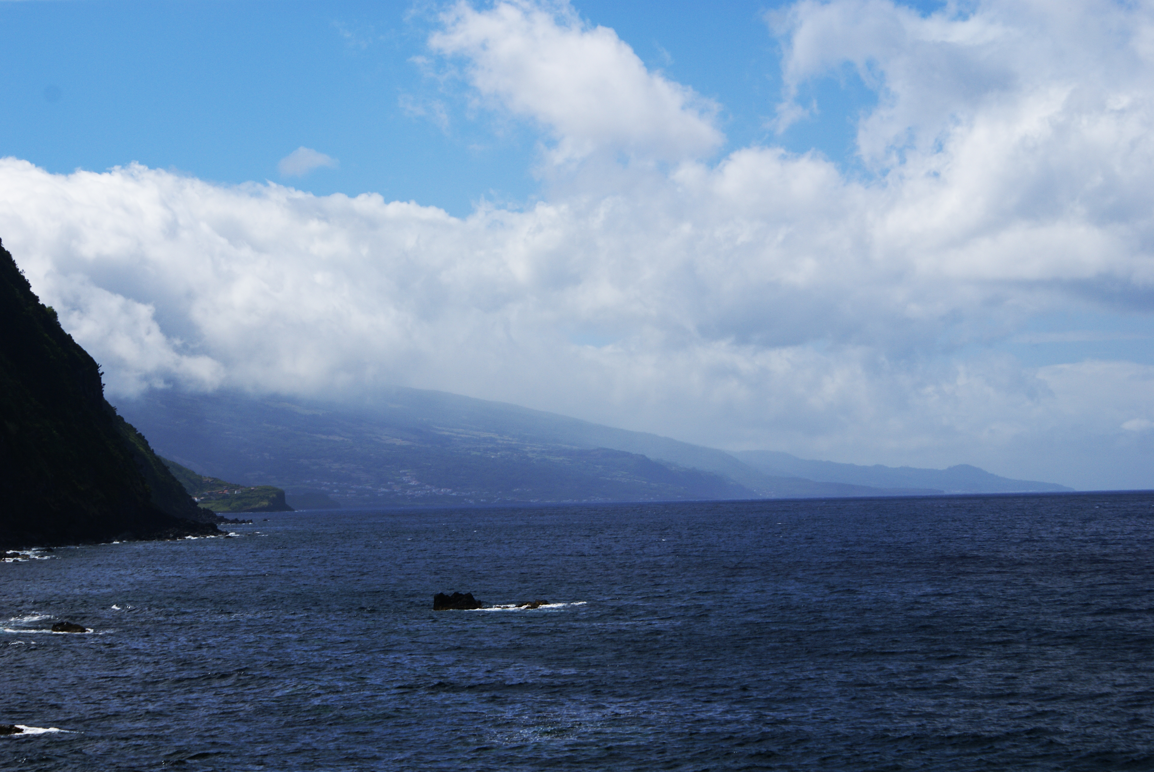 Fajã da Baíxa, Paisagem de fundo, Lajes do Pico, ilha do Pico, Açores, Portugal